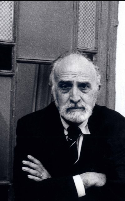 El poeta Joan Argenté (Badalona, 1931)